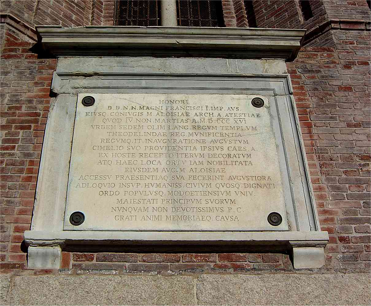 MB Monza lapide marmorea apposta alla base del campanile del Duomo di Monza in onore di Francesco I d'Austria e consorte datata 1816